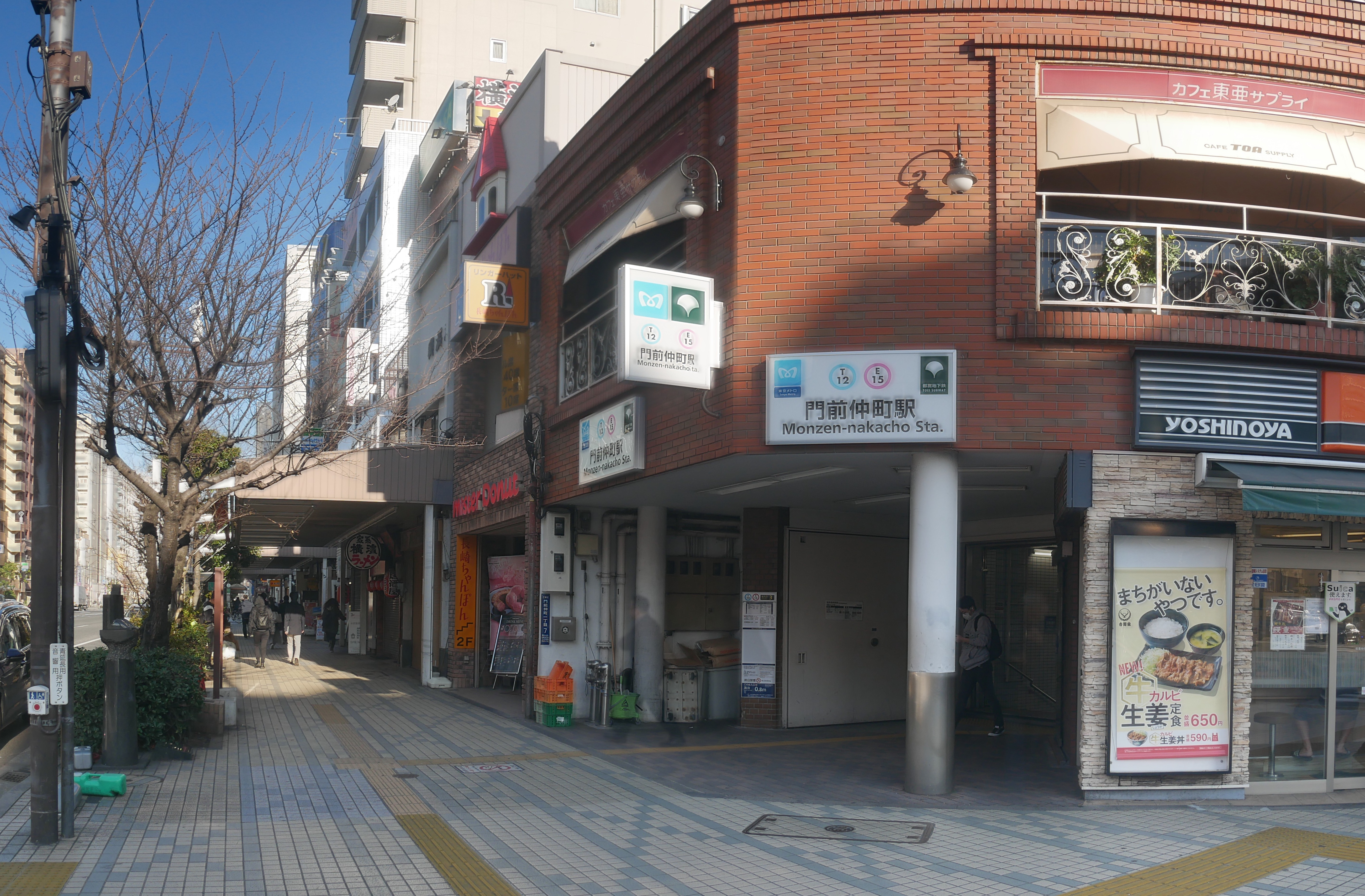 Monzen-nakacho Station, exit 3 (門前仲町駅、3番出口)